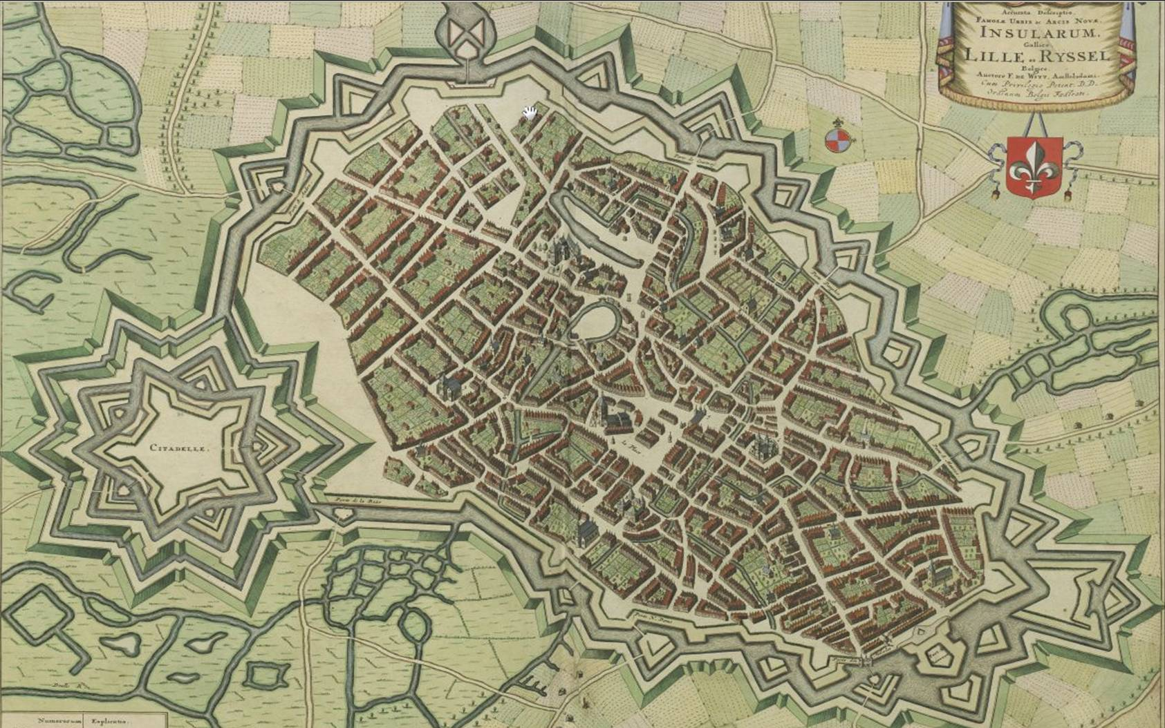 Rijsel,_Frankrijk,_Sanderus,_Flandria_Illustrata.jpg